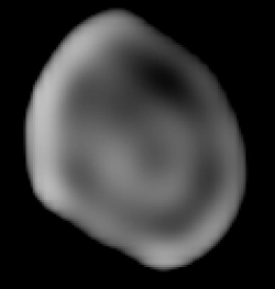 L'asteroide 511 Davida fotografato dal Keck Observatory, dicembre 2002. Credit: W.M. Keck Observatory